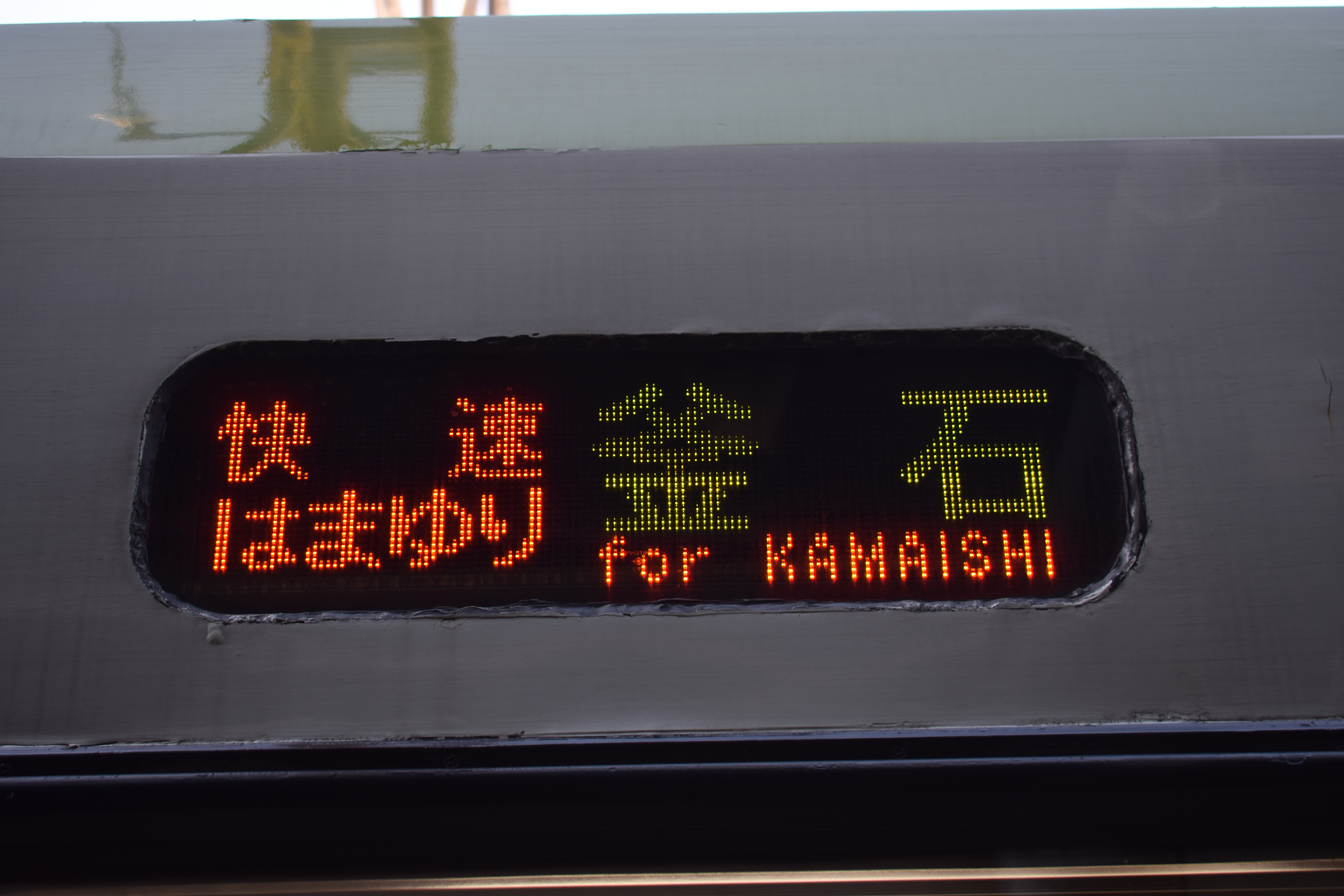 快速はまゆり 釜石行き